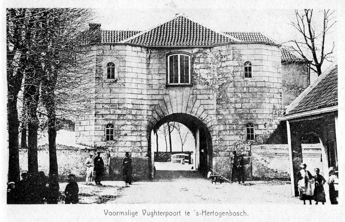 Oude ansicht Vughter Poort